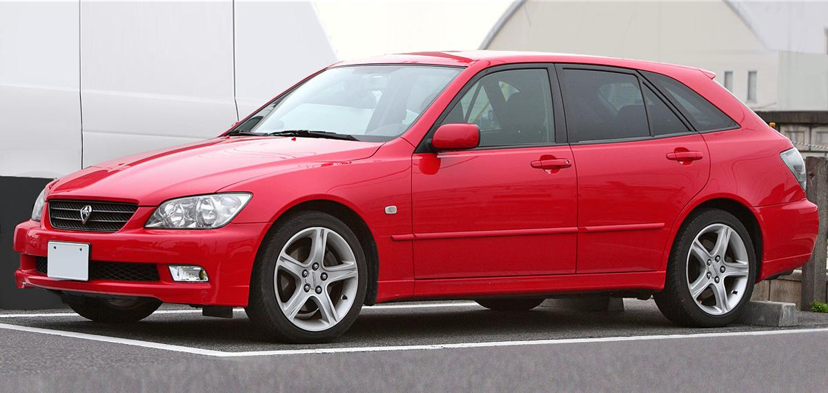 Toyota Altezza Gita AS200 Z Edition ( GXE10W )